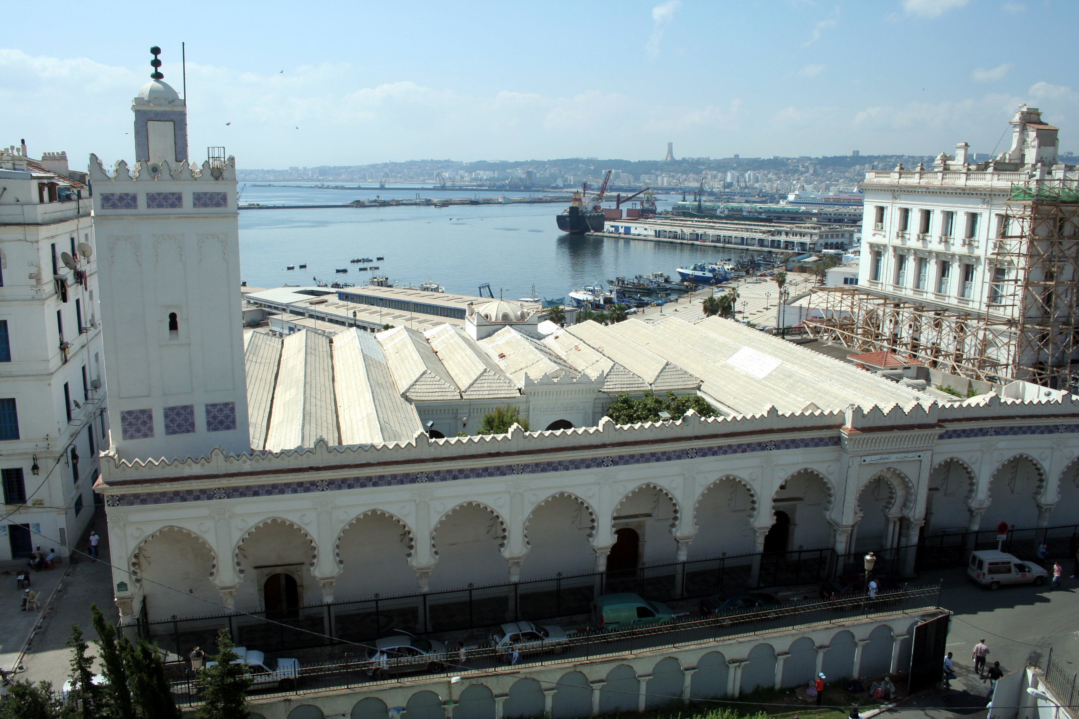 La Grande Mosquée d'Alger (Algérie), vue du parking de Sahat Chouhada.